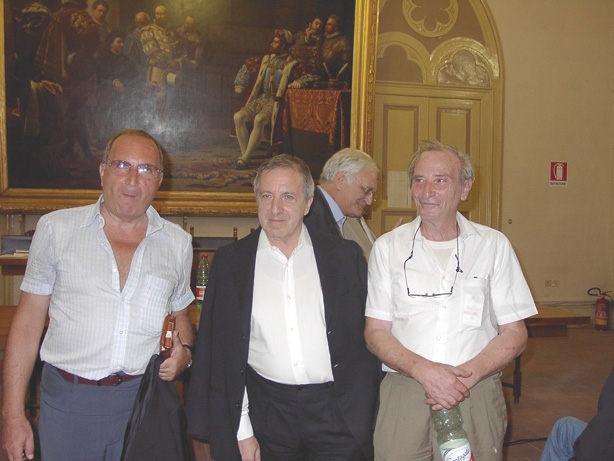 Il regista teatrale Roberto De Simone (al centro) in compagnia dei fratelli Raffaele (a sinistra) e Claudio (a destra), nella cerimonia per i suoi settant'anni, il 25 agosto 2003, a Sessa Aurunca.